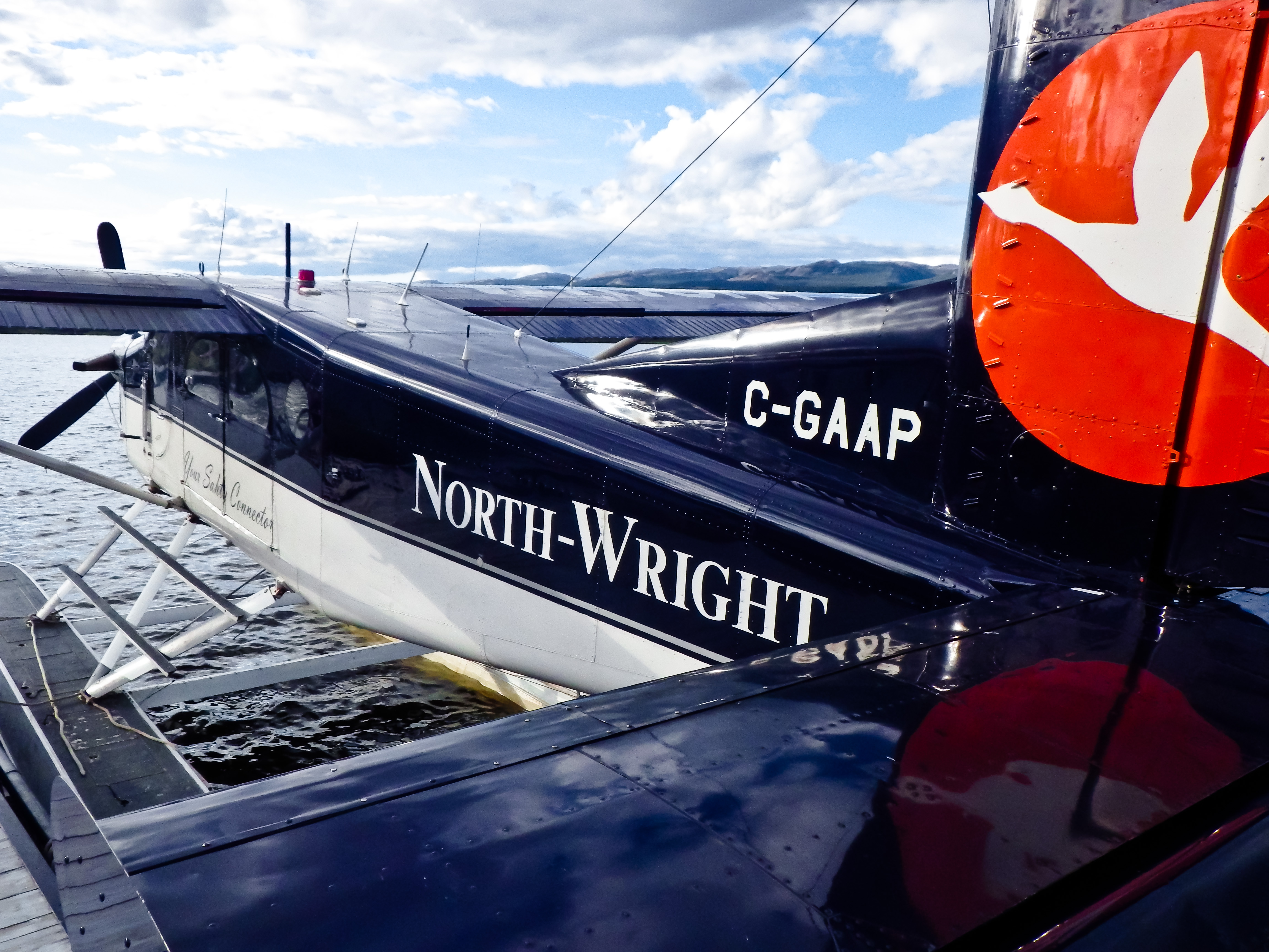 Pilatus Porter